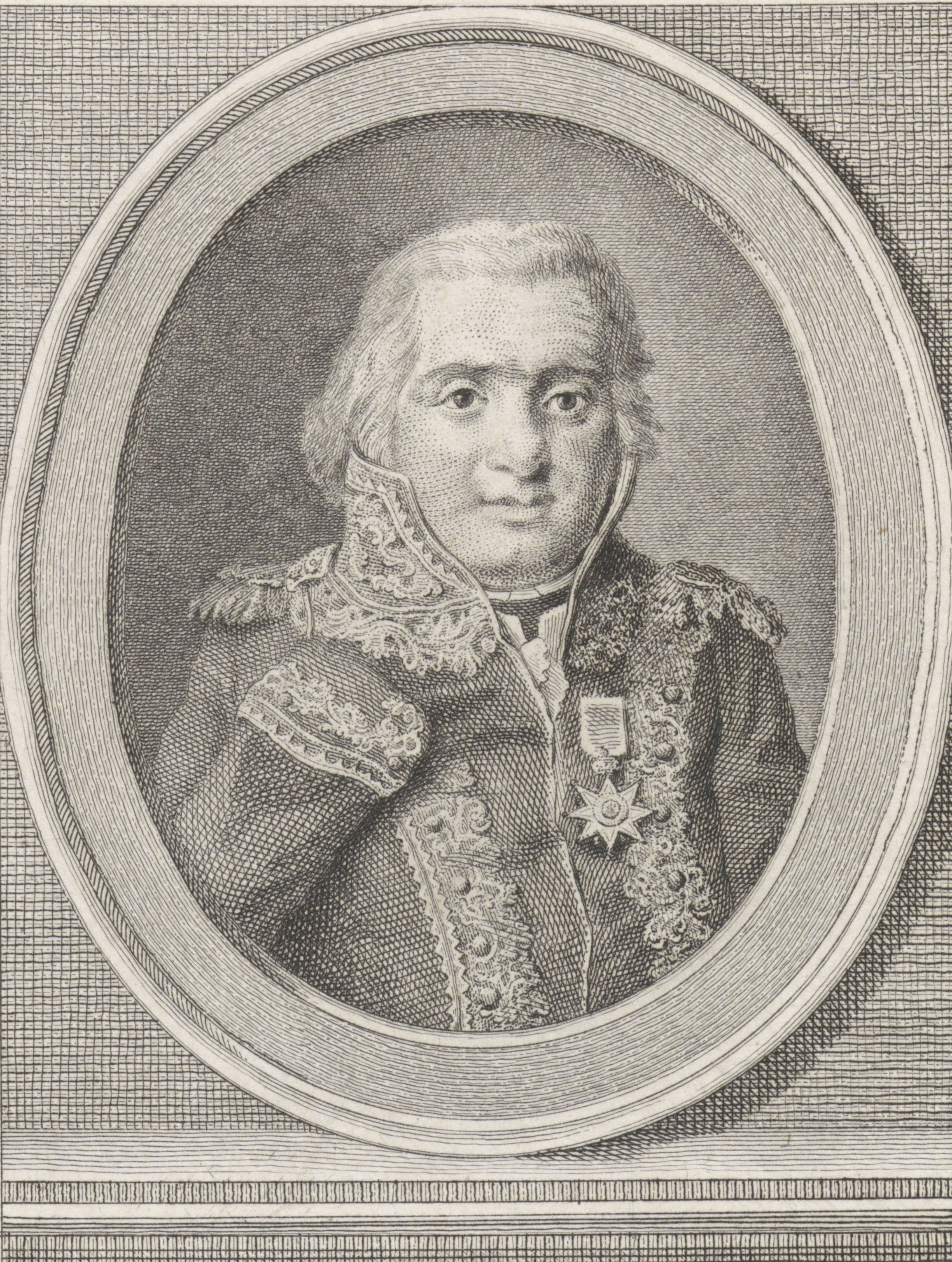 Schout-bij-nacht Bloys van Treslong als Ridder in de Orde van de Unie, na 1807